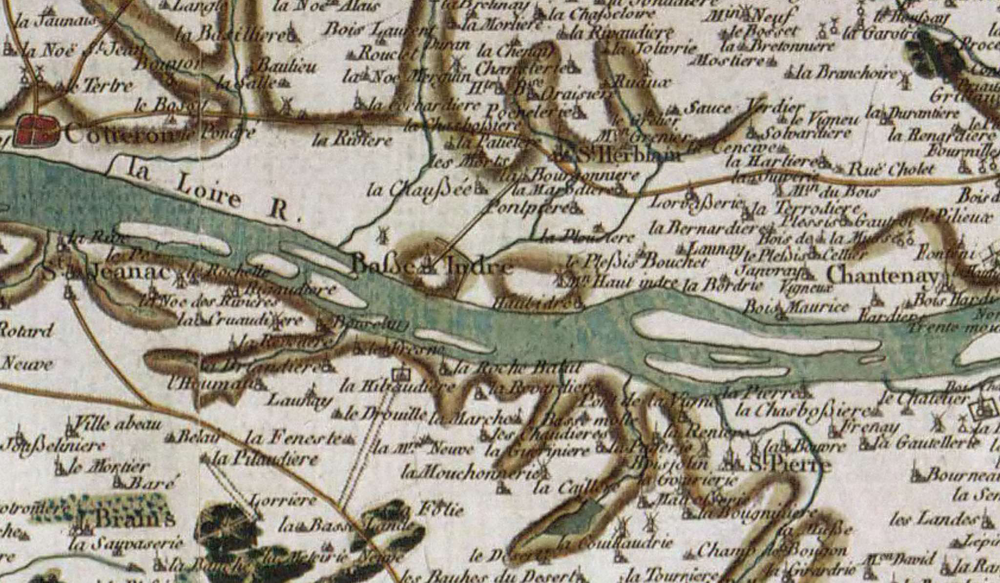 Issu de la carte de Cassini